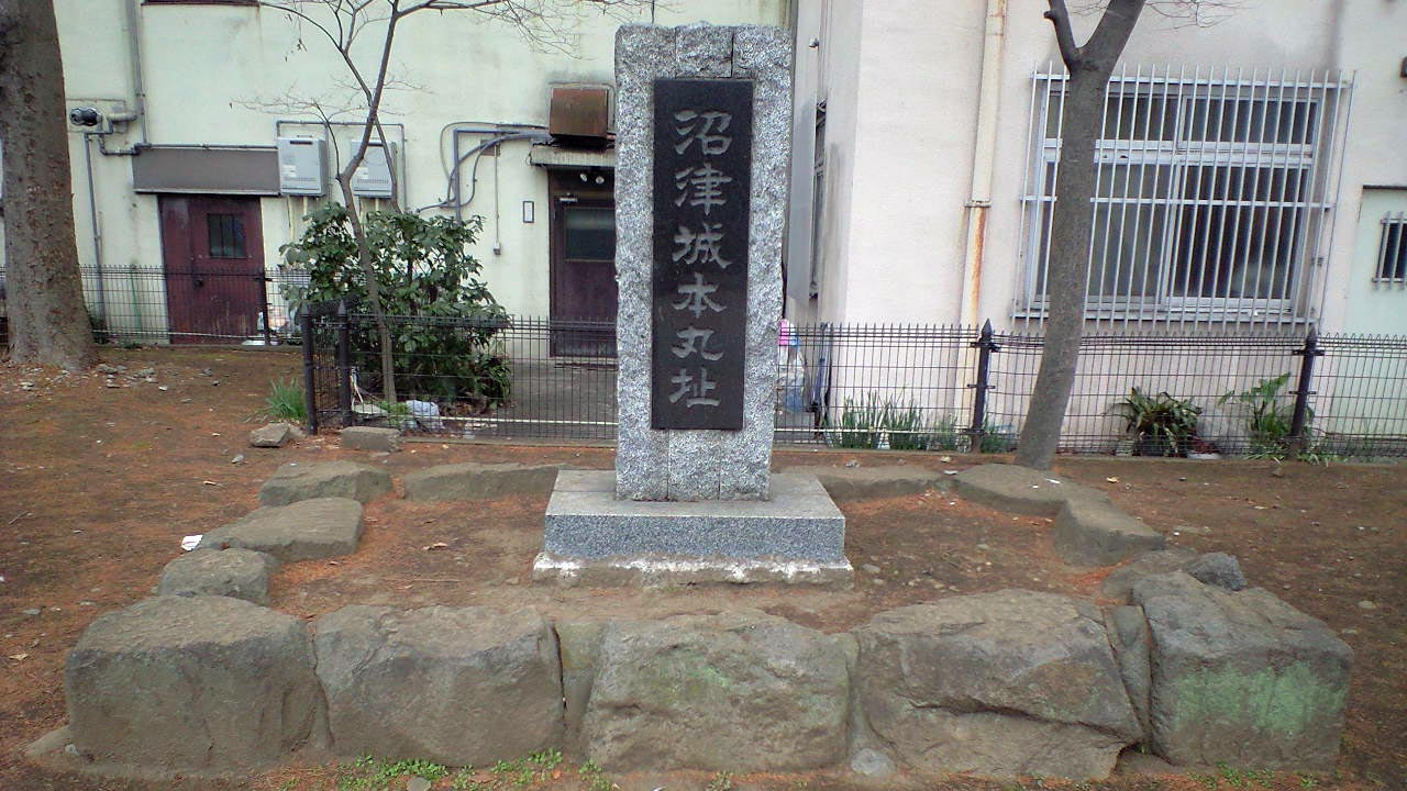 静岡県沼津市大手町（中央公園）、沼津城本丸址